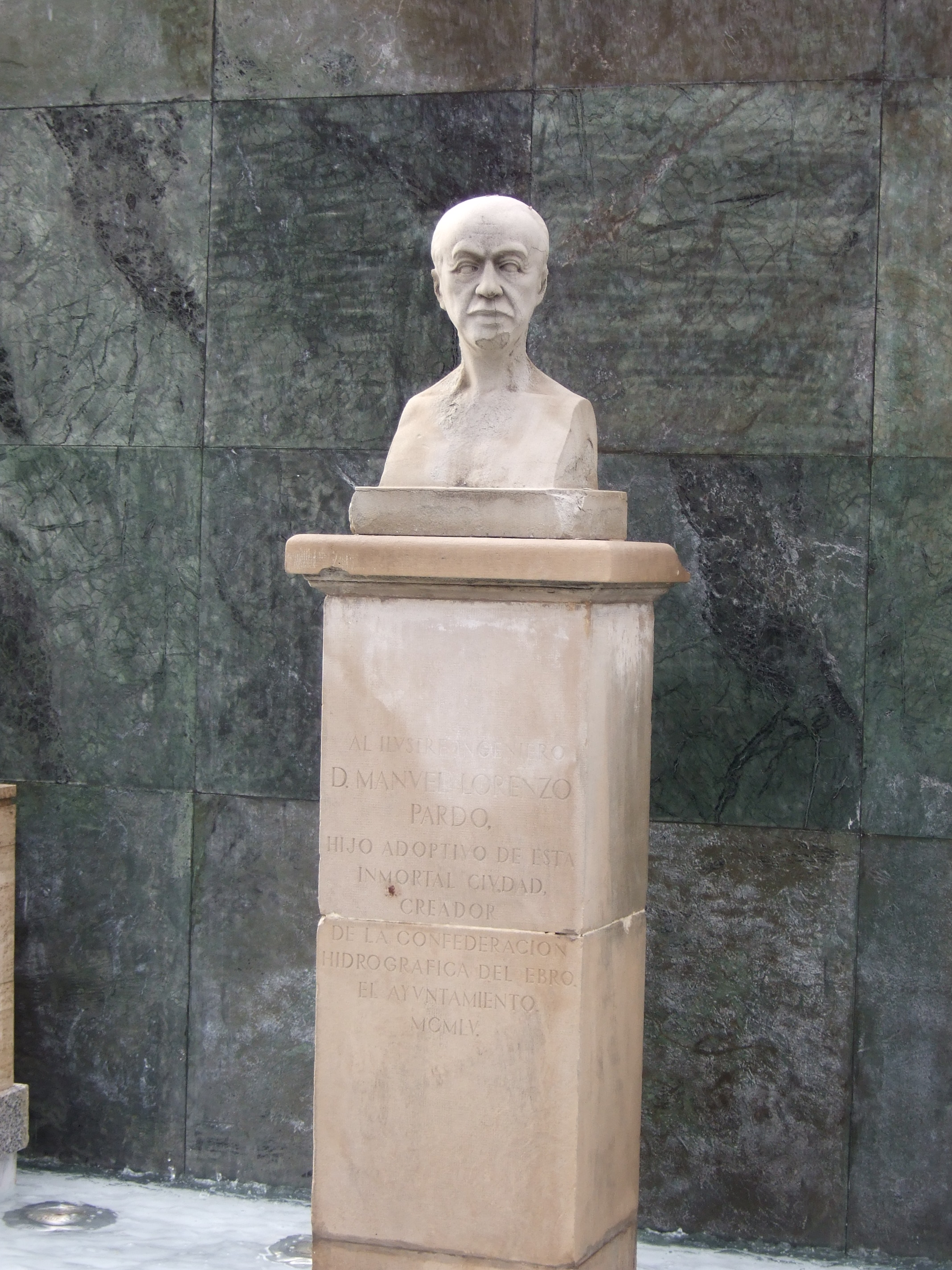 Zaragoza - Busto 1955 de Manuel Lorenzo Pardo (1922 - 1997) - Creador de la Confederación Hidrográfica del Ebro y fundador de la Real Sociedad Fotográfica de Zaragoza